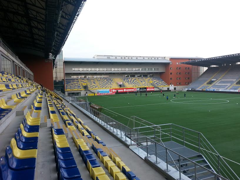 Stvv stadion